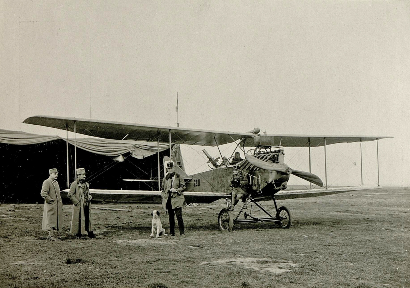 Flugapparat Typ.Brandenburger